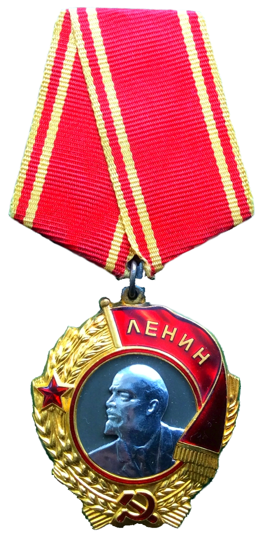 Орден Ленина № 278413, награждена Турова Любовь Ивановна. Аверс. Прозрачный фон.